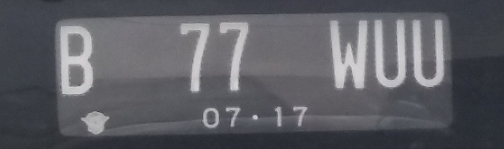 Kfz-Kennzeichen Indonesien (Jakarta) mit 3 Kennbuchstaben